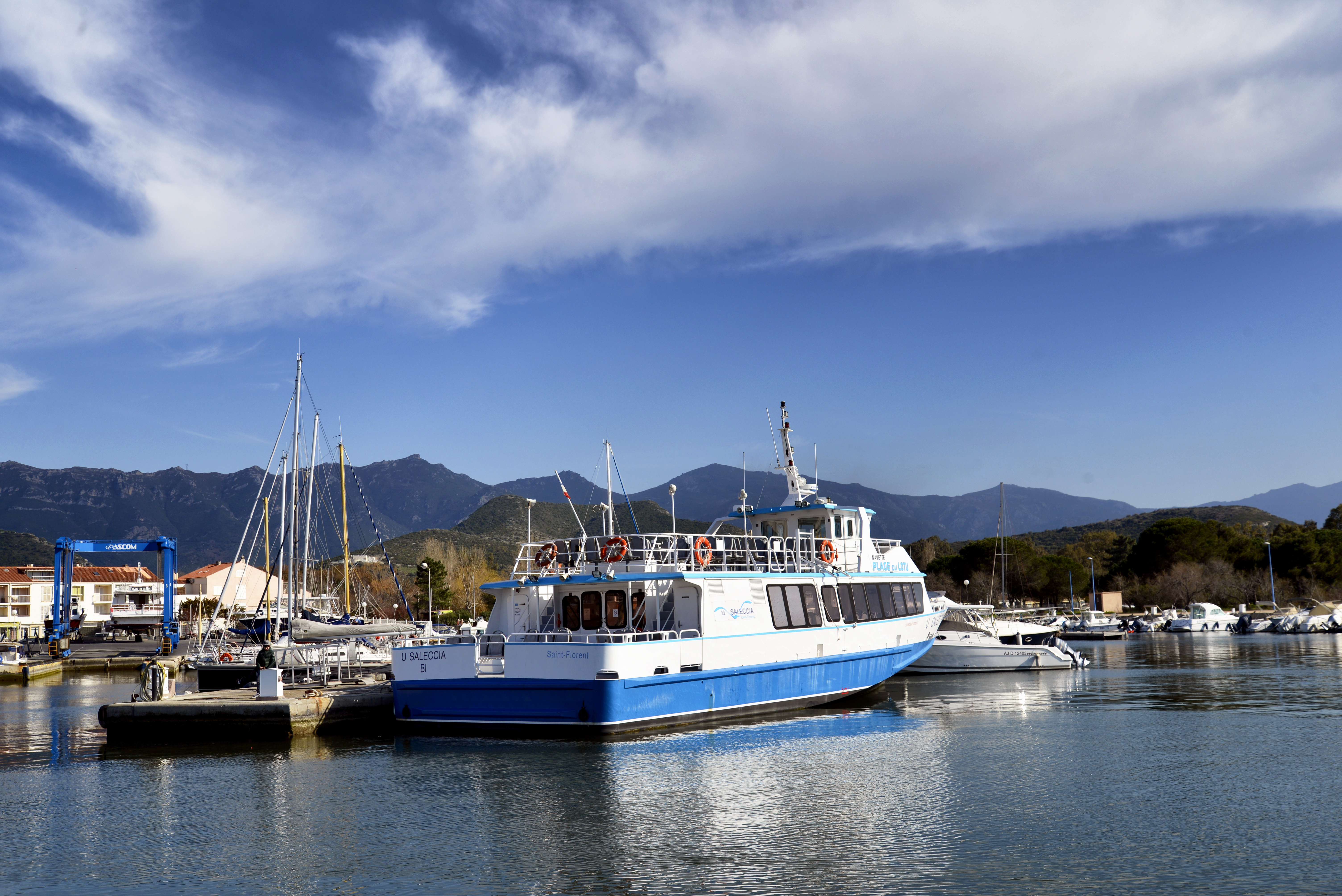 Saint-Florent, Nebbio (Corse) - Le Saleccia au port